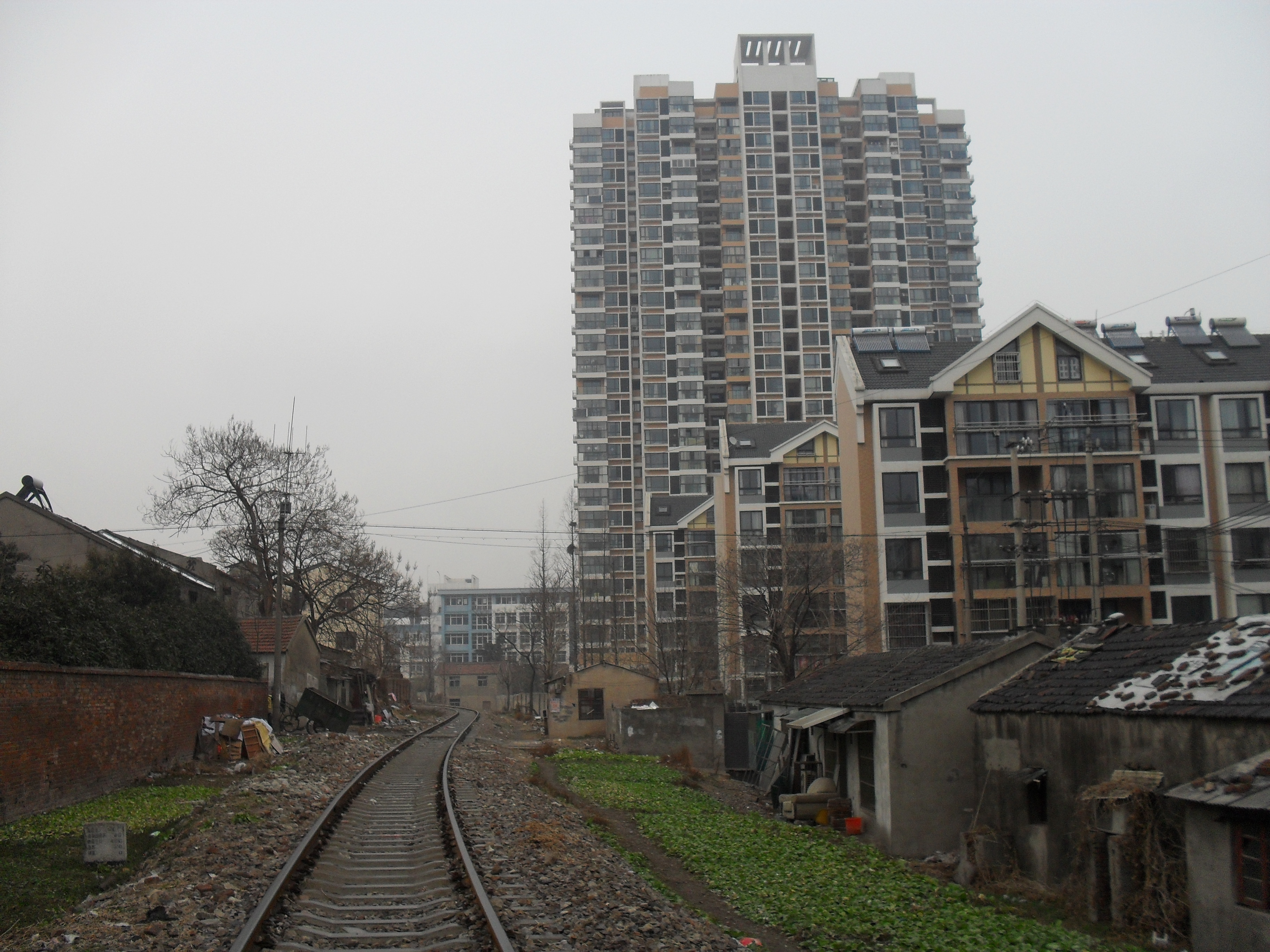 南京路子铺处机场专用铁路